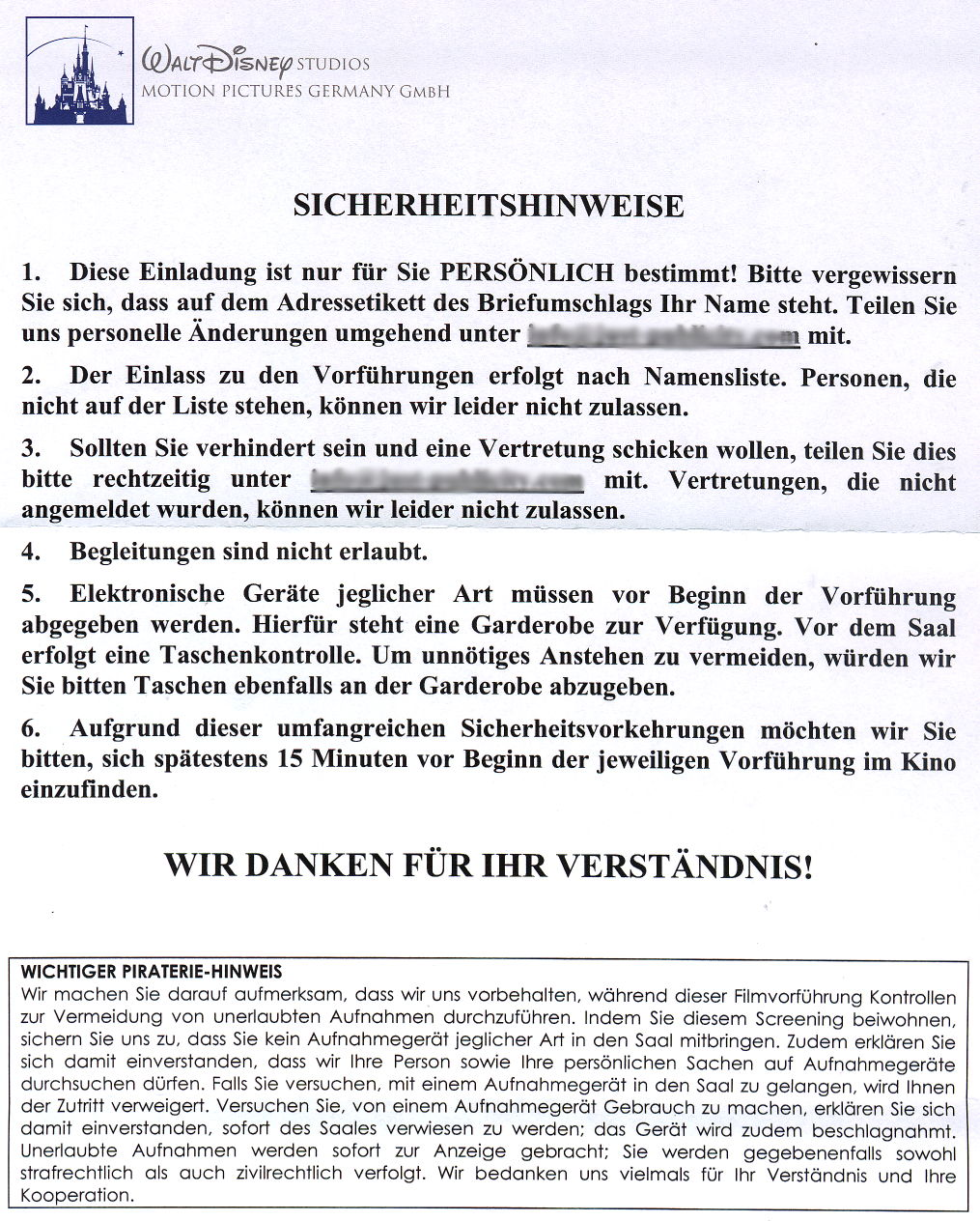 Sicherheitshinweise zu einer Presseeinführung